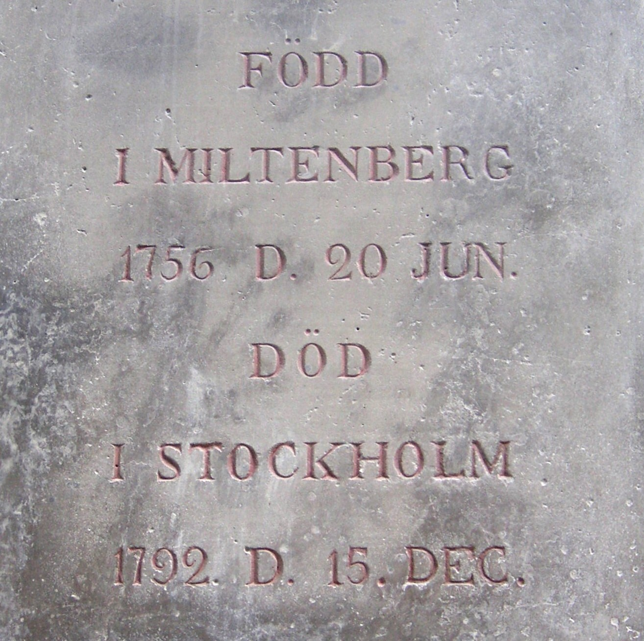 Inskription på Kraus' gravmonument i Pipers park, Solna